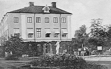 Forsmarks herrgård på ett vykort från 1906, södra fasaden